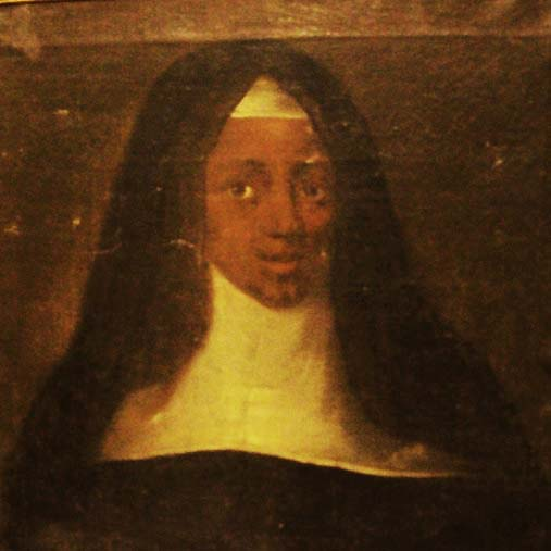 Tableau du musée de Melun, découvert en 2014 par l'historien Serge Aroles